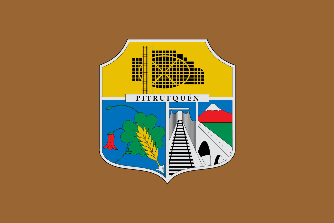 Bandera utilizada por el municipio de Pitrufquén